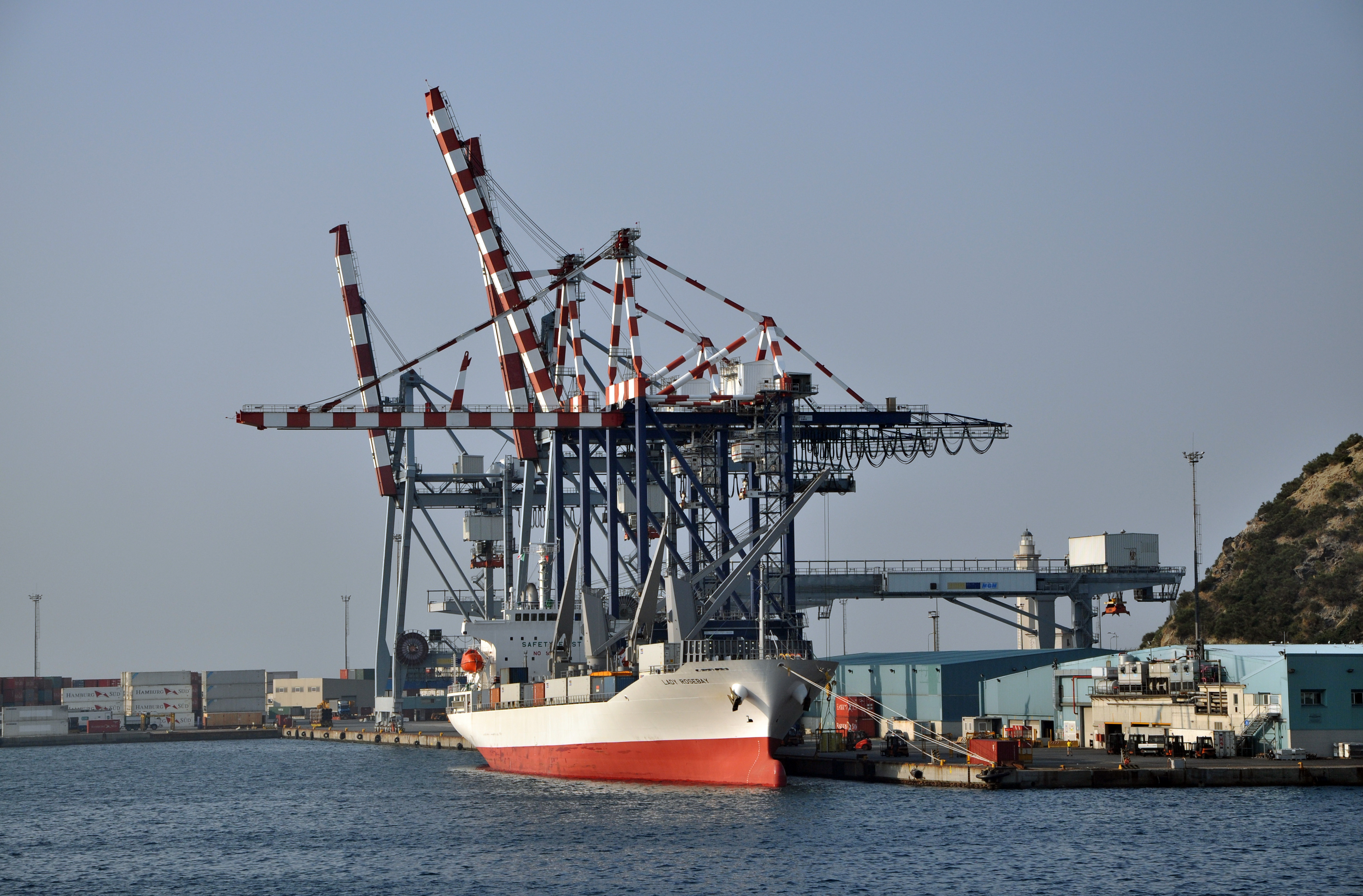 Port of Vado Ligure